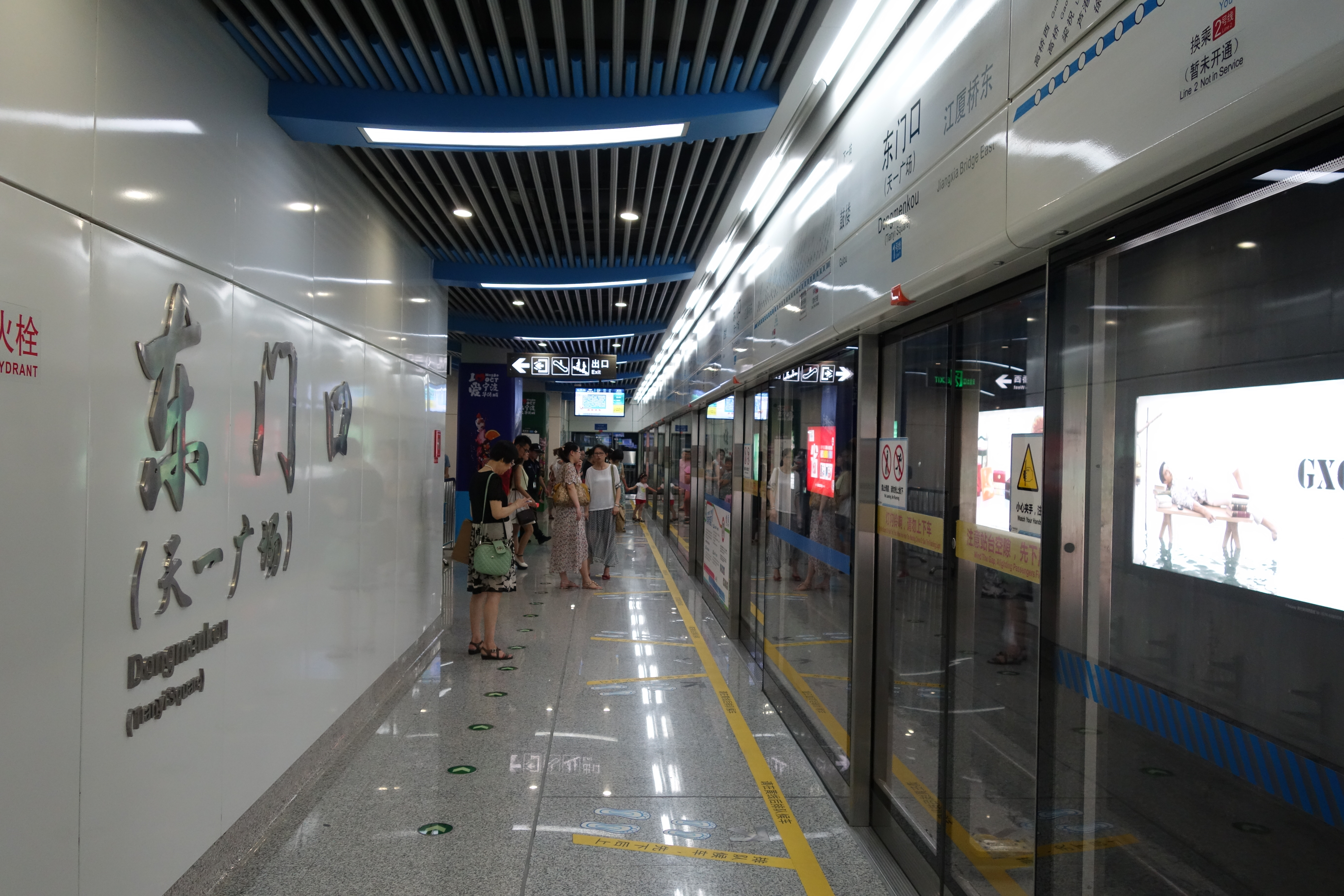 东门口站站台